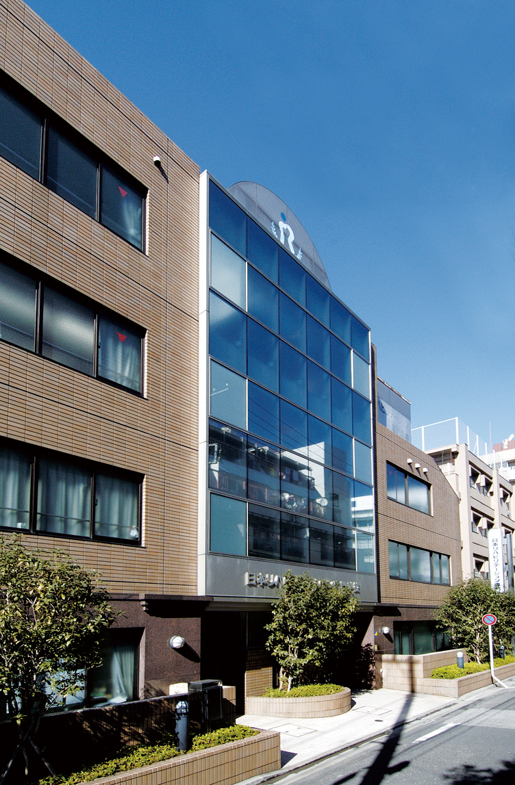 日本リハビリテーション専門学校外観